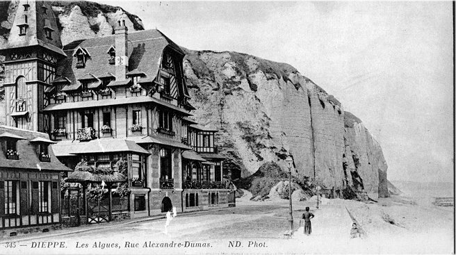 La rue Alexandre Dumas à Dieppe avant 1930. Les Algues, Rue Alexandre Dumas